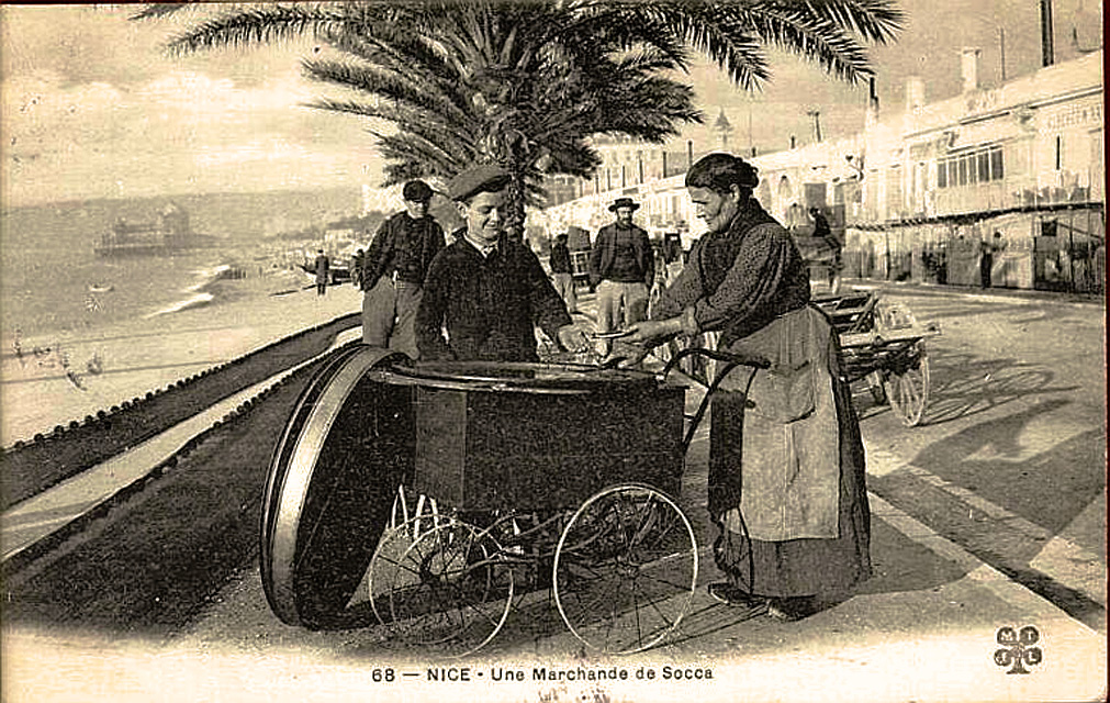 Marchande de socca, spécialité culinaire niçoise à base de farine de pois chiche, au début du XXe siècle